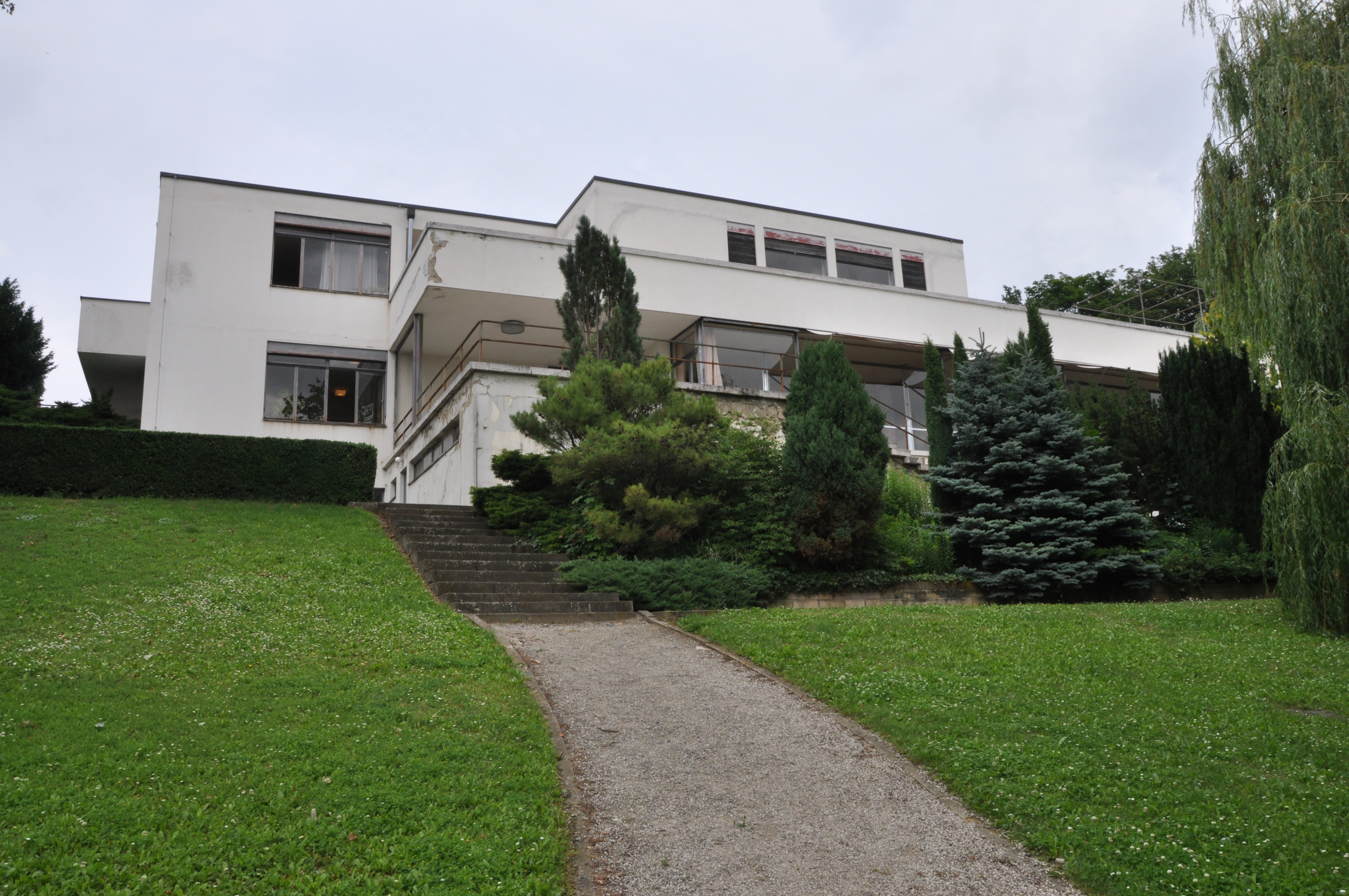 Вилла Тугендгат в Брно, Чехия — входит в число памятников всемирного наследия ЮНЕСКО.